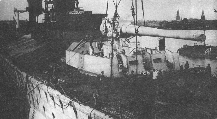 На броненосный корабль "Дойчланд" устанавливают орудия главного калибра.